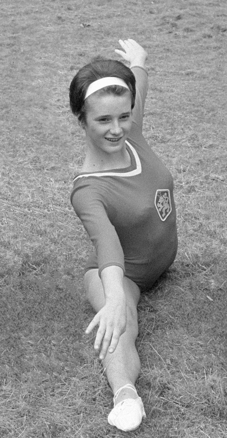 Damesturnen: Nederland tegen Tsjecho-Slowakije in Arnhem [Terborg]. Hana Lišková